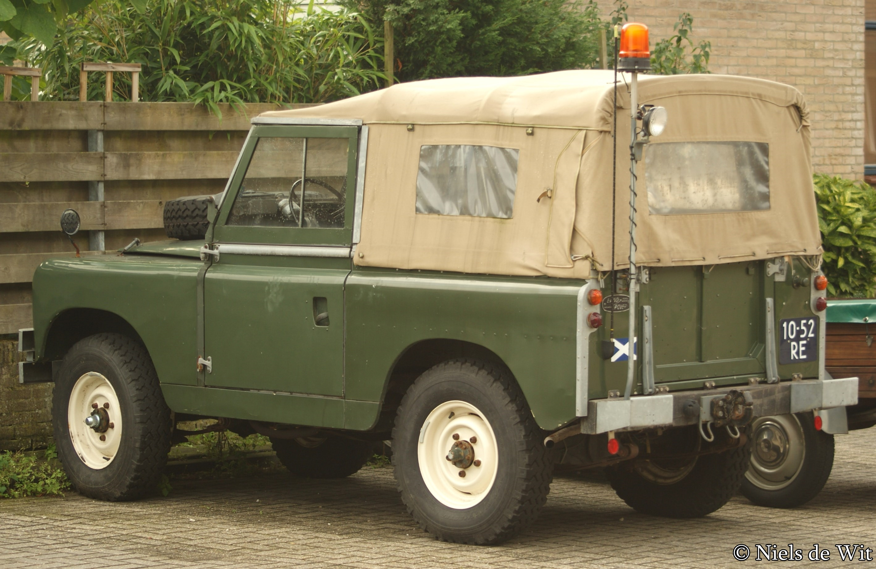 10-52-RE